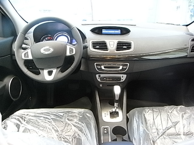 ルノーサムスン・SM3